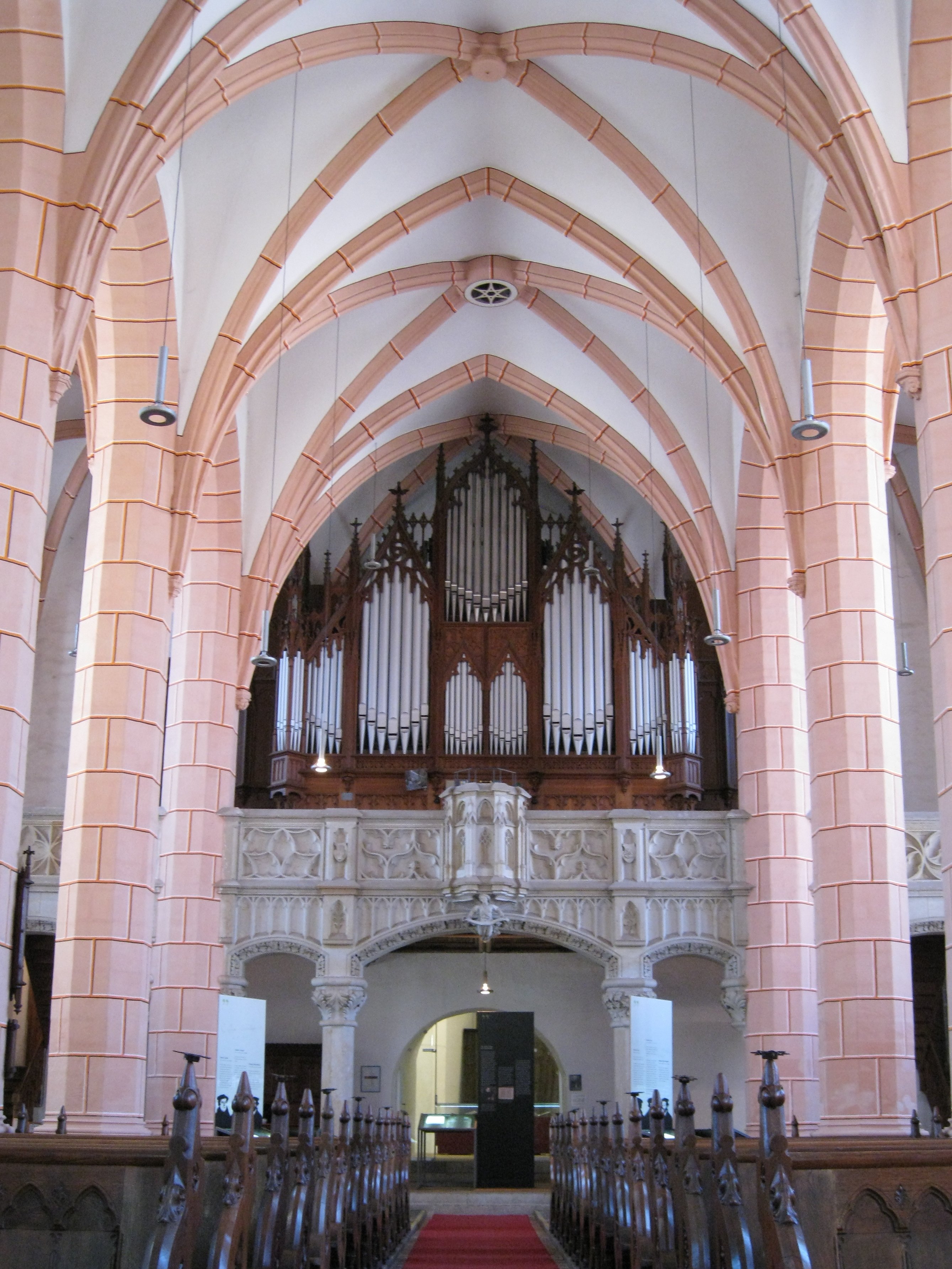 Orgel der Bartholomäikirche in Altenburg